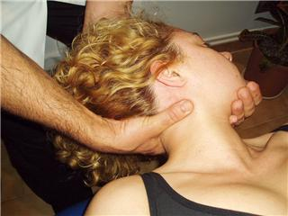 toma que hice yo